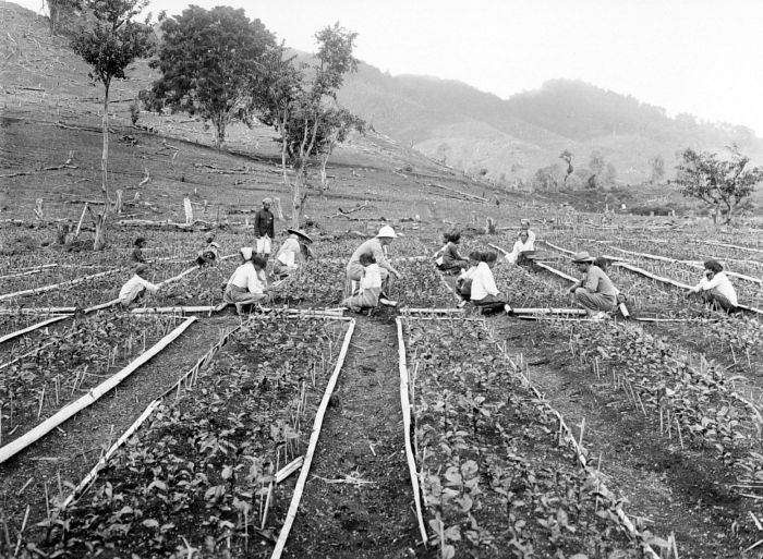 Repronegatief. Thee-kweekbedden zonder afdak, Java